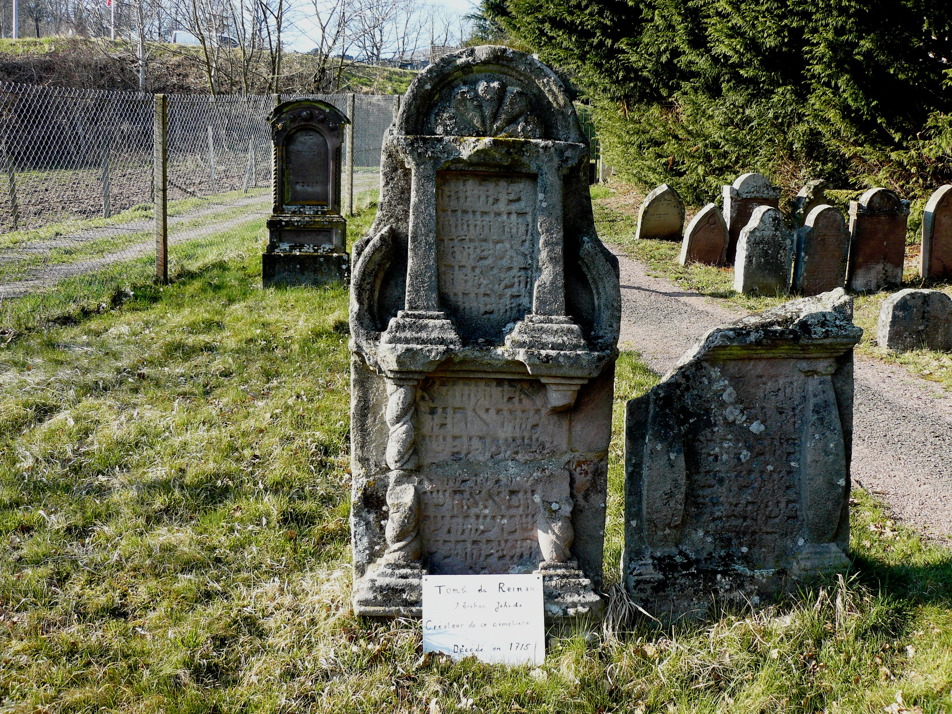 Tombe de Reinau Abraham Jehuda à l'origine de la création du cimetière israélite de Jungholtz. Décédé en 1715.